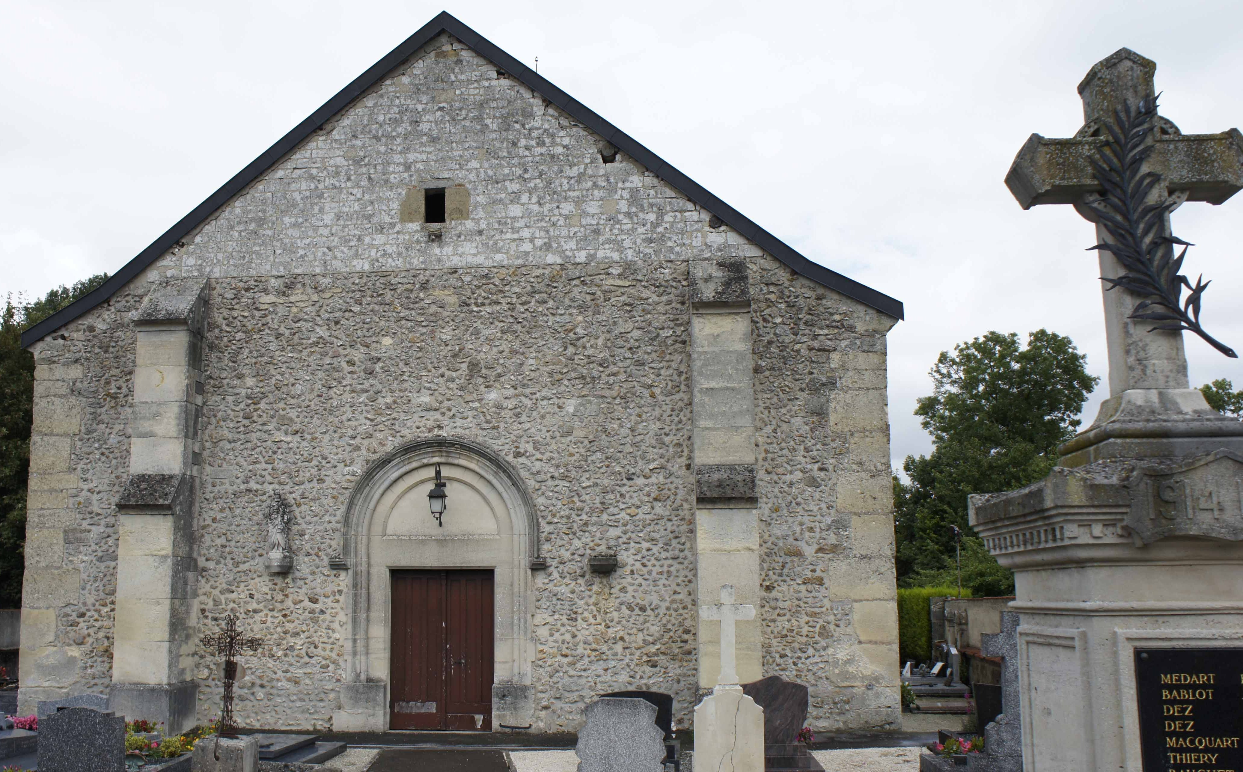 Vue de l'église avec autour le cimetière et le monument aux morts de 14-18 à Jonchery-sur-Suippe.